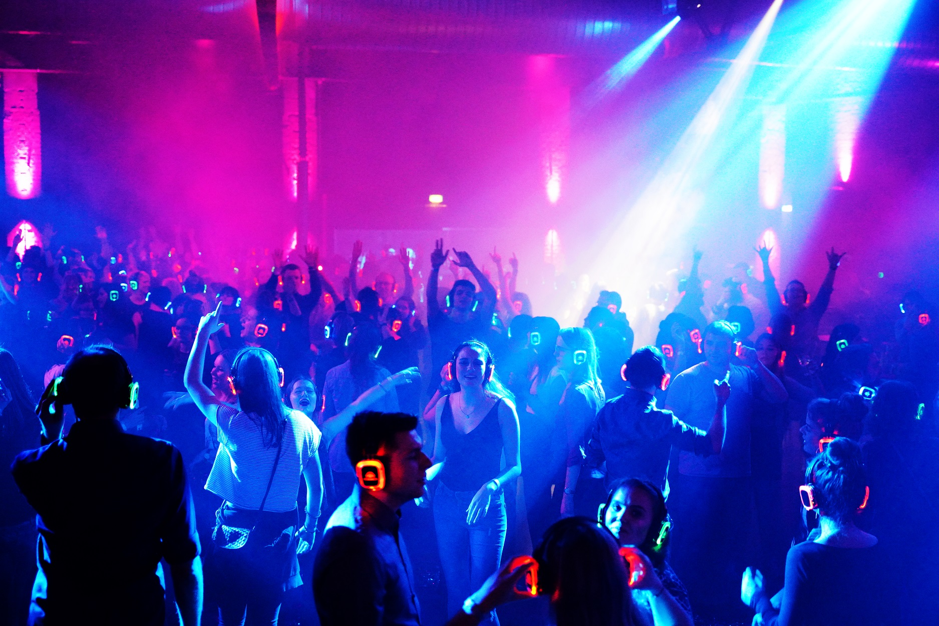 Silent Events Party im Lokschuppen Bielefeld (Hauke Thimm Photography)